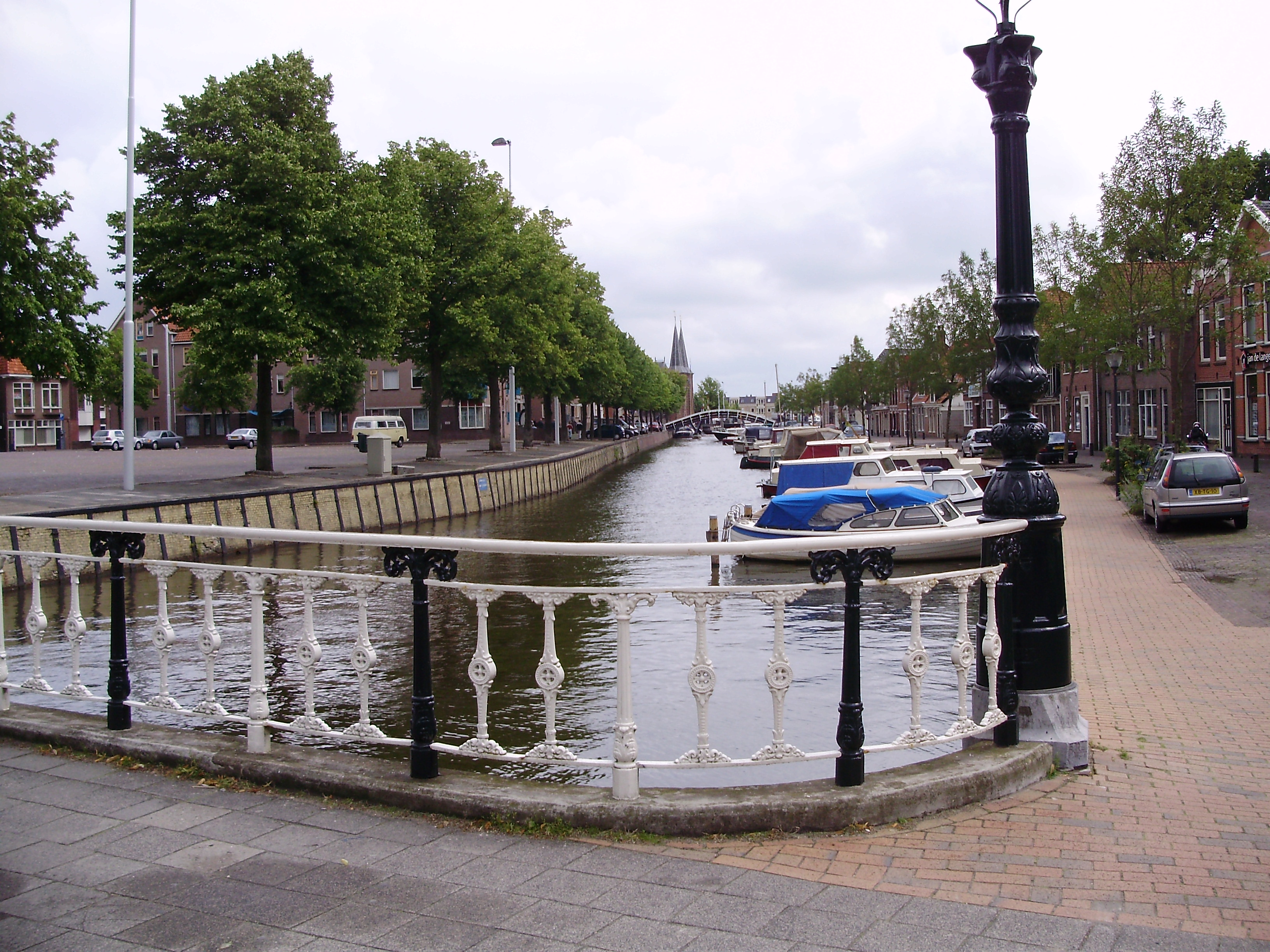 De Stadsgracht in Sneek (links: Martiniplein) in gemeente Súdwest Fryslân